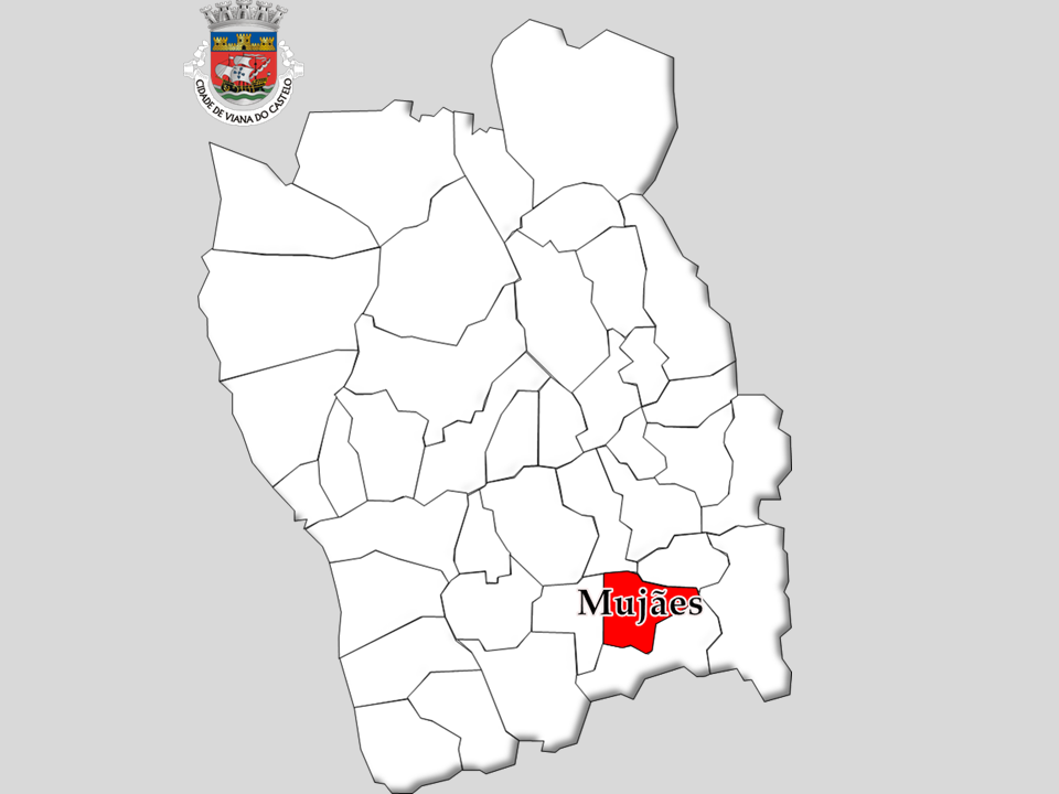 Censos 1864/2011